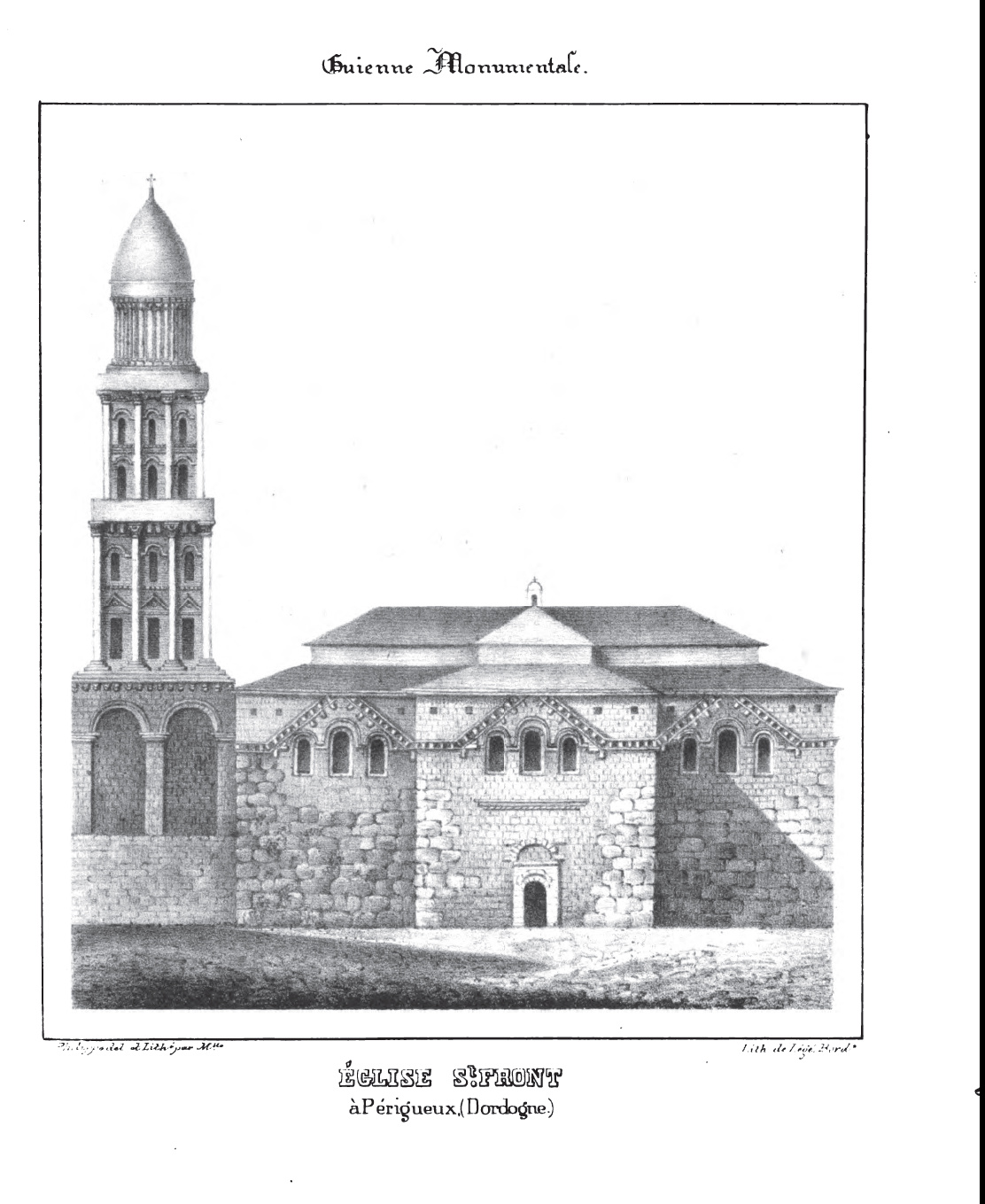 Eglise St Front Périgueux (1842)